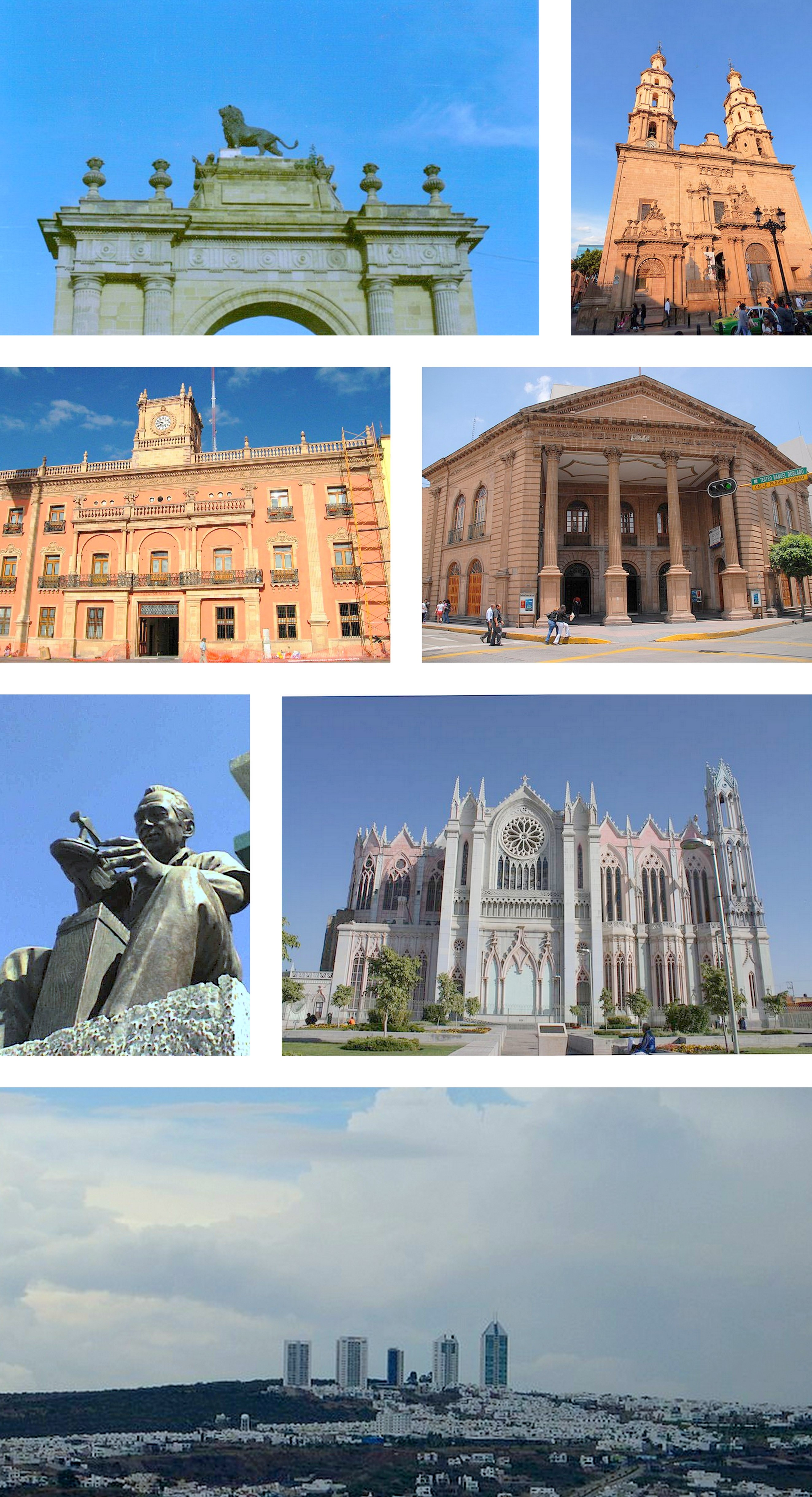 Montaje de imágenes de León. Arco de la calzada Catedral de León Templo expiatorio Teatro Manuel Doblado Monumento al calzado Casa Municipal Vista Metropolitana de León